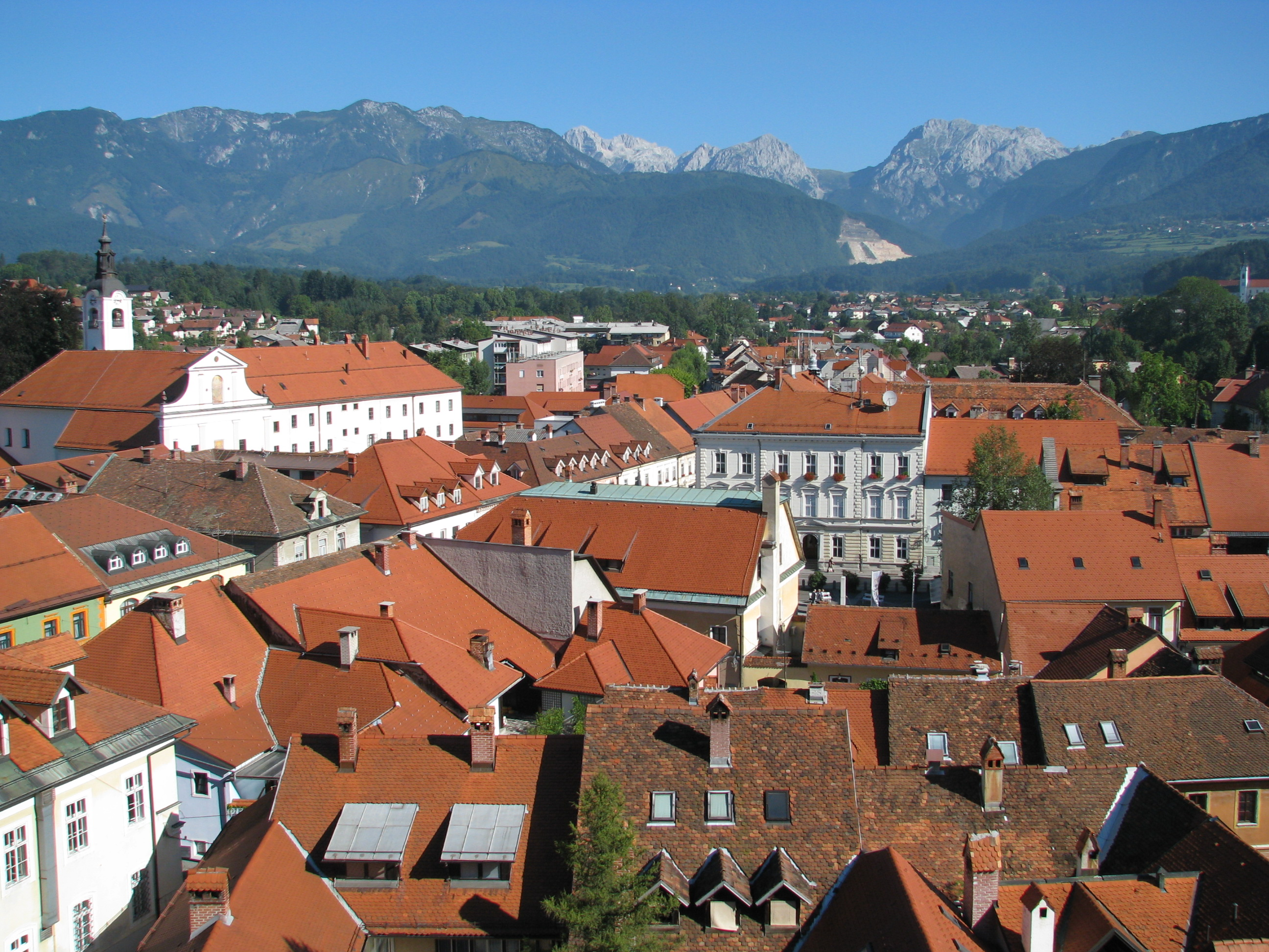 Staro mestno jedro slikano z Malograjskega griča